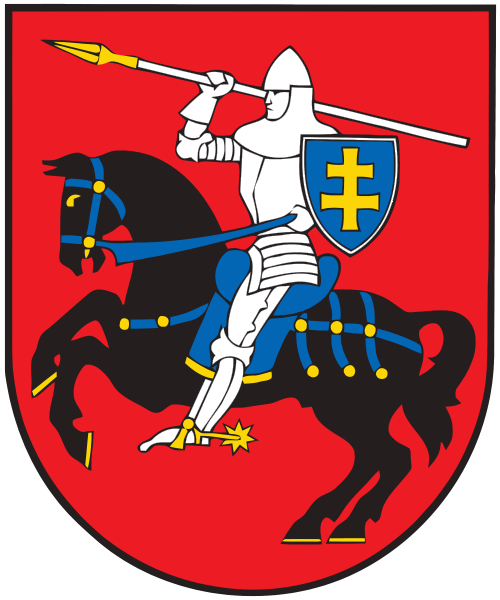 Kategorija:Lietuvos savivaldybių herbai